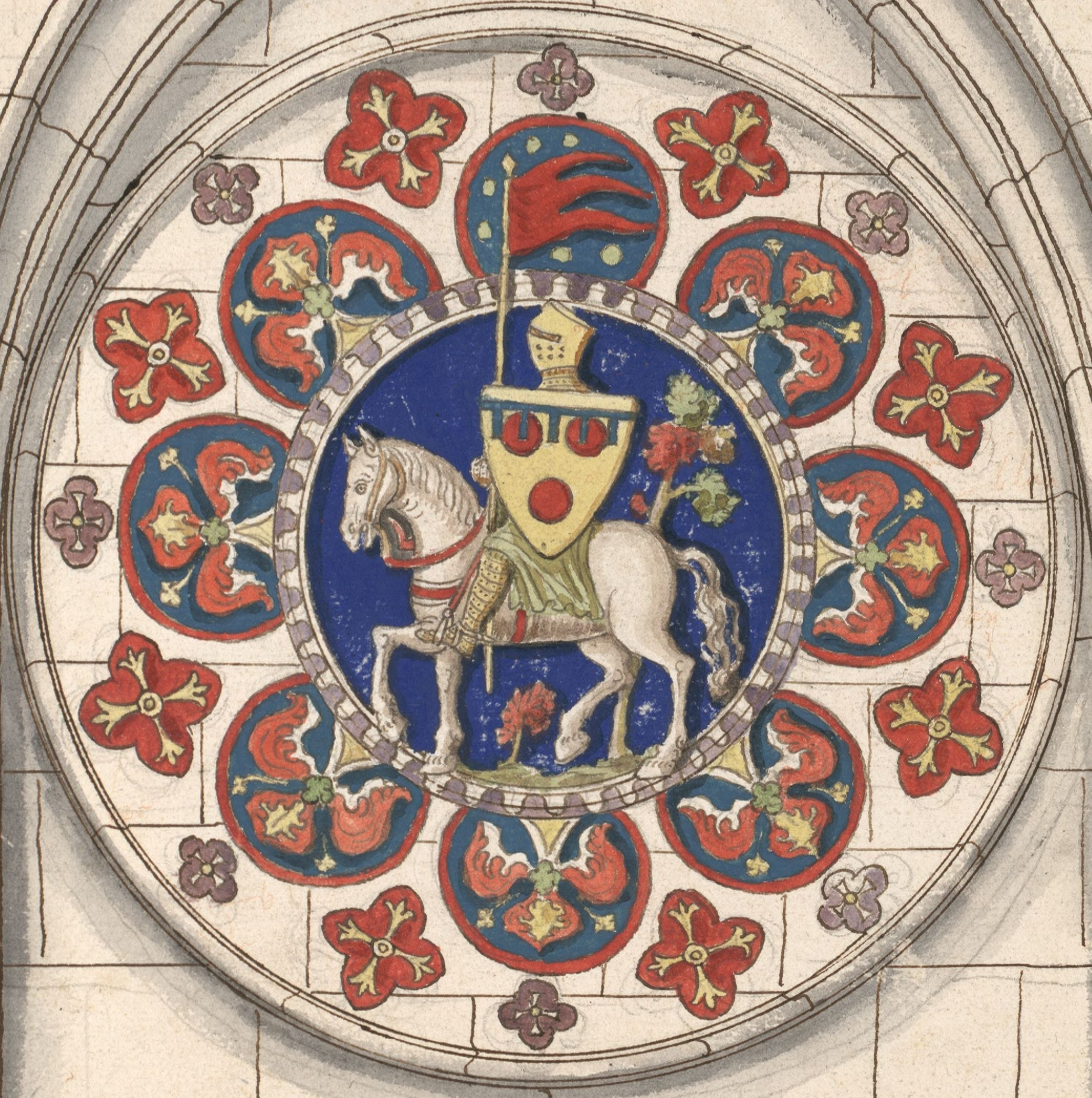 Pierre de Courtenay († 1250), seigneur de Conches et de Mehun